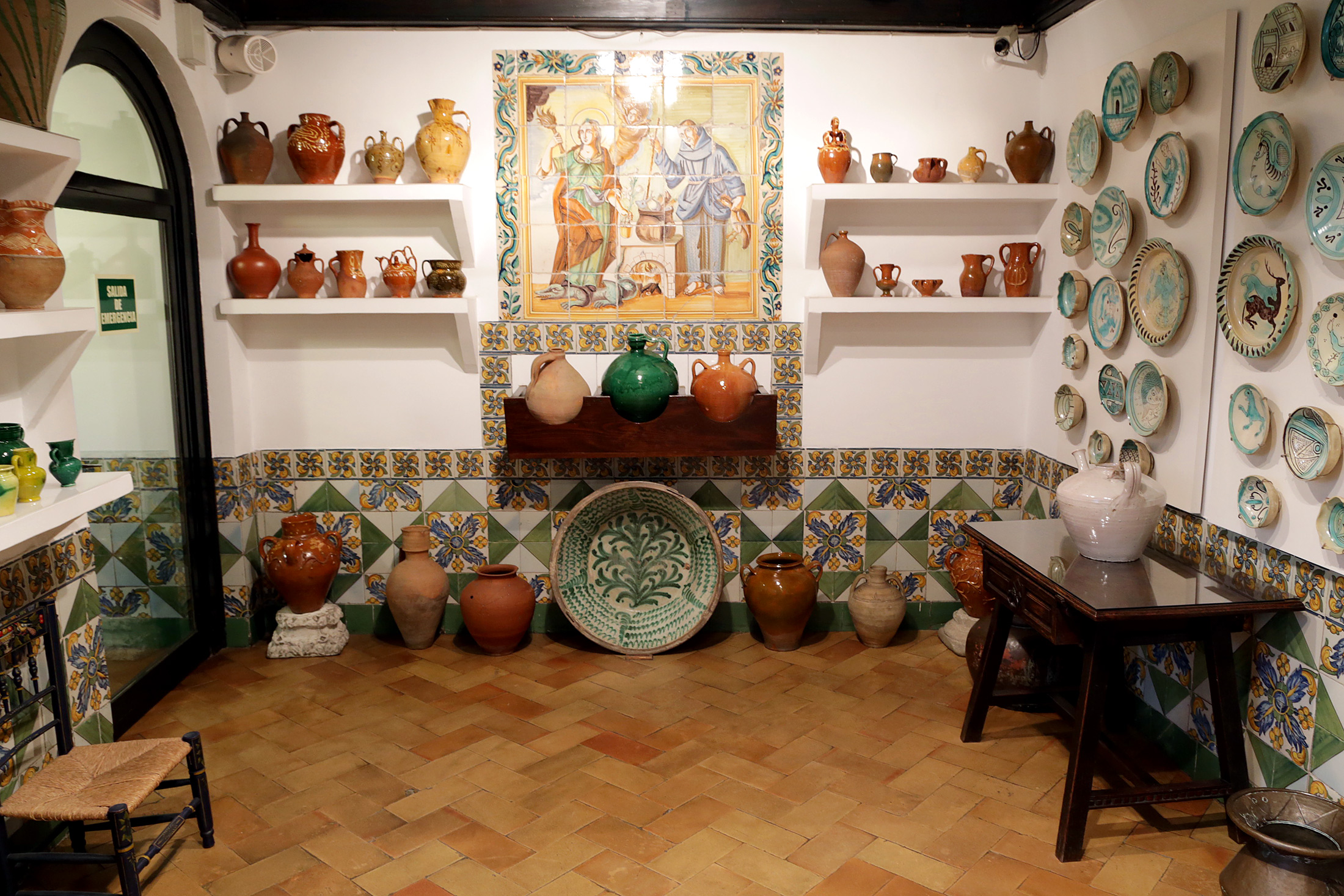 Museo Sorolla de Madrid, interior.